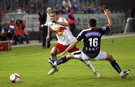 Laszlo Bodnar im Spiel gegen Sturm Graz